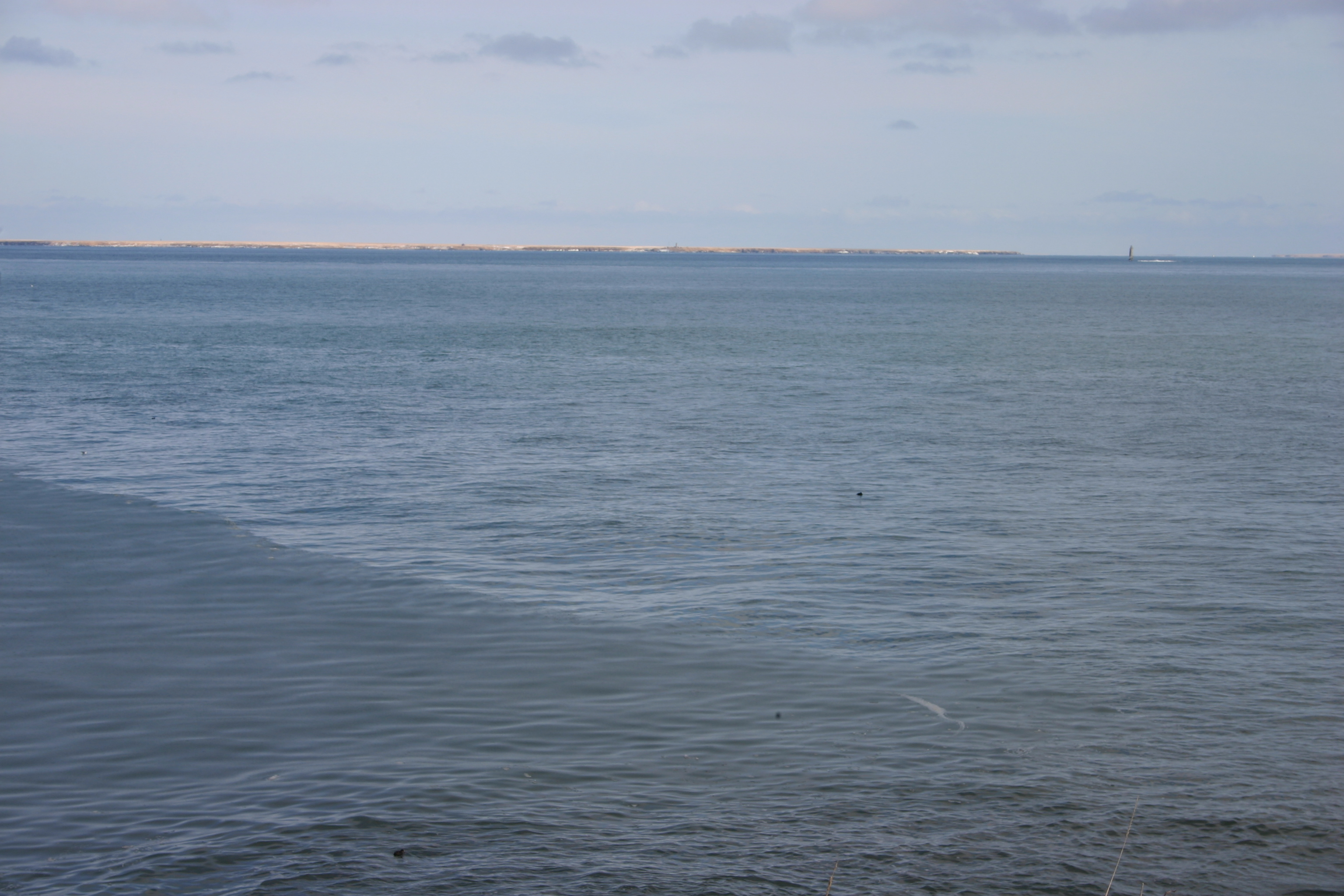 珸瑶瑁水道越しの貝殻島灯台と歯舞諸島